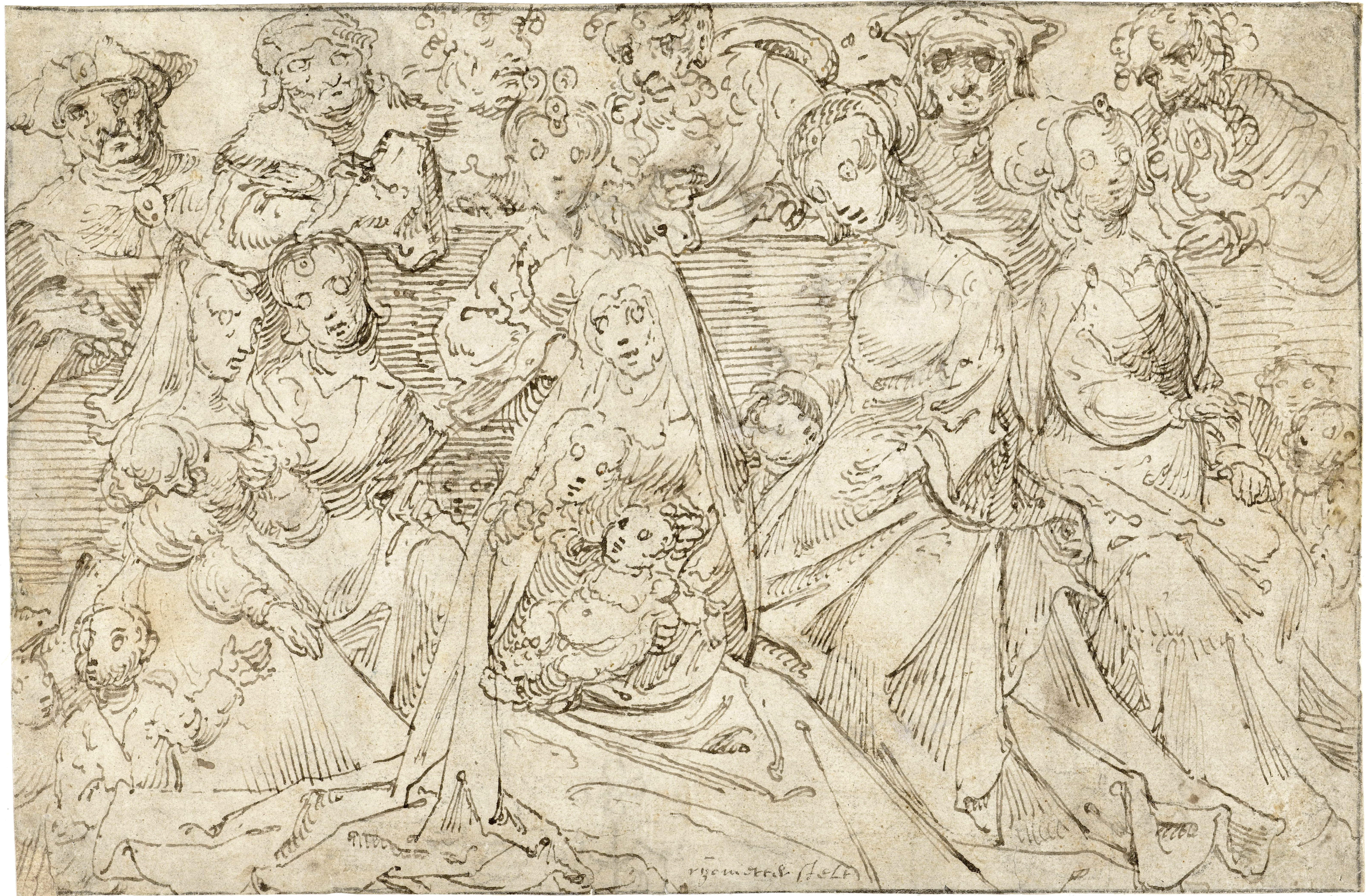 Rijckert Aertz: Heilige Maagschap van Christus. Pentekening in bruin. Collectie Rijksmuseum RP-T-1959-264(R)